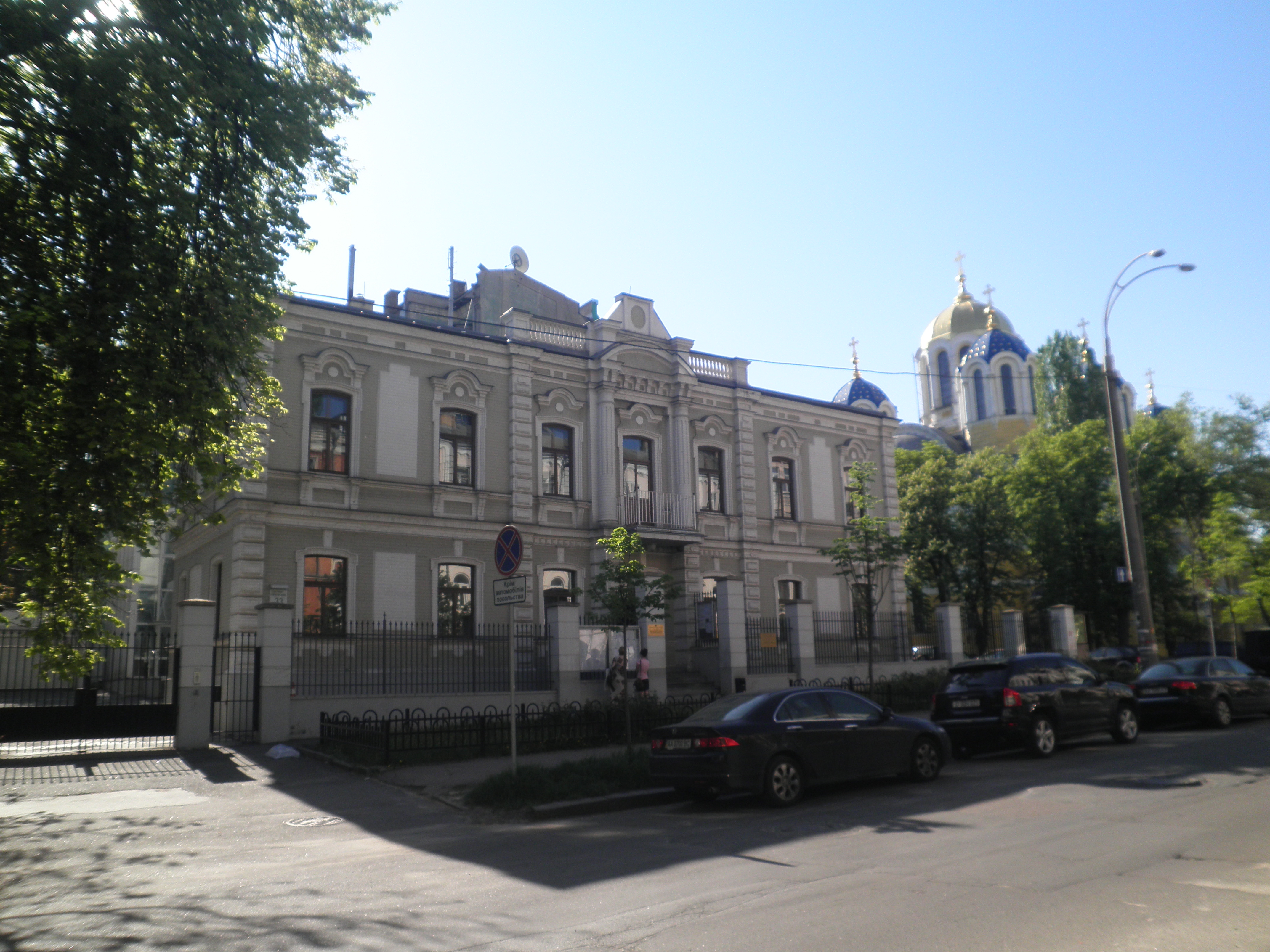 Будівля Посольства Австрії в Києві